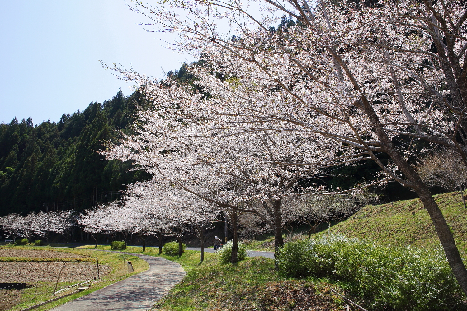 桜並木（恵那市上矢作町小田子、2013年（平成25年）4月）